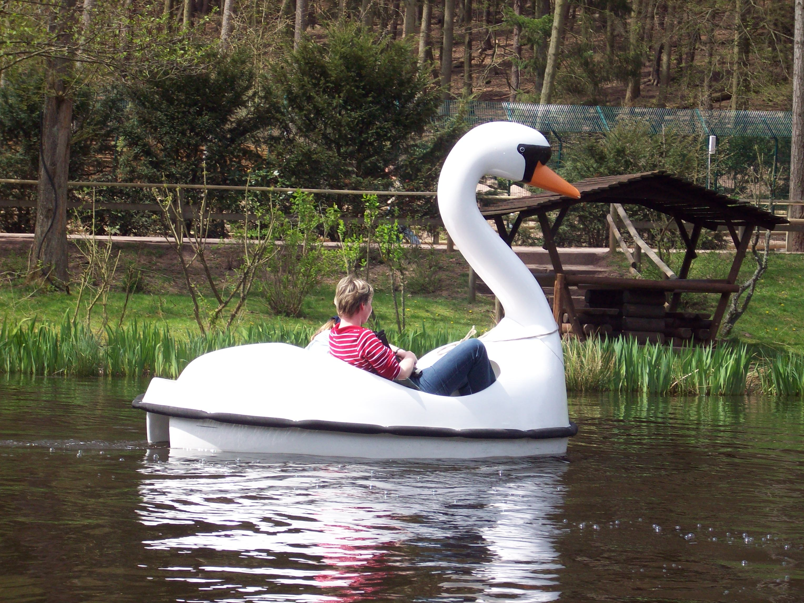 Schwanentretboote des Kurpfalz-Parks Wachenheim